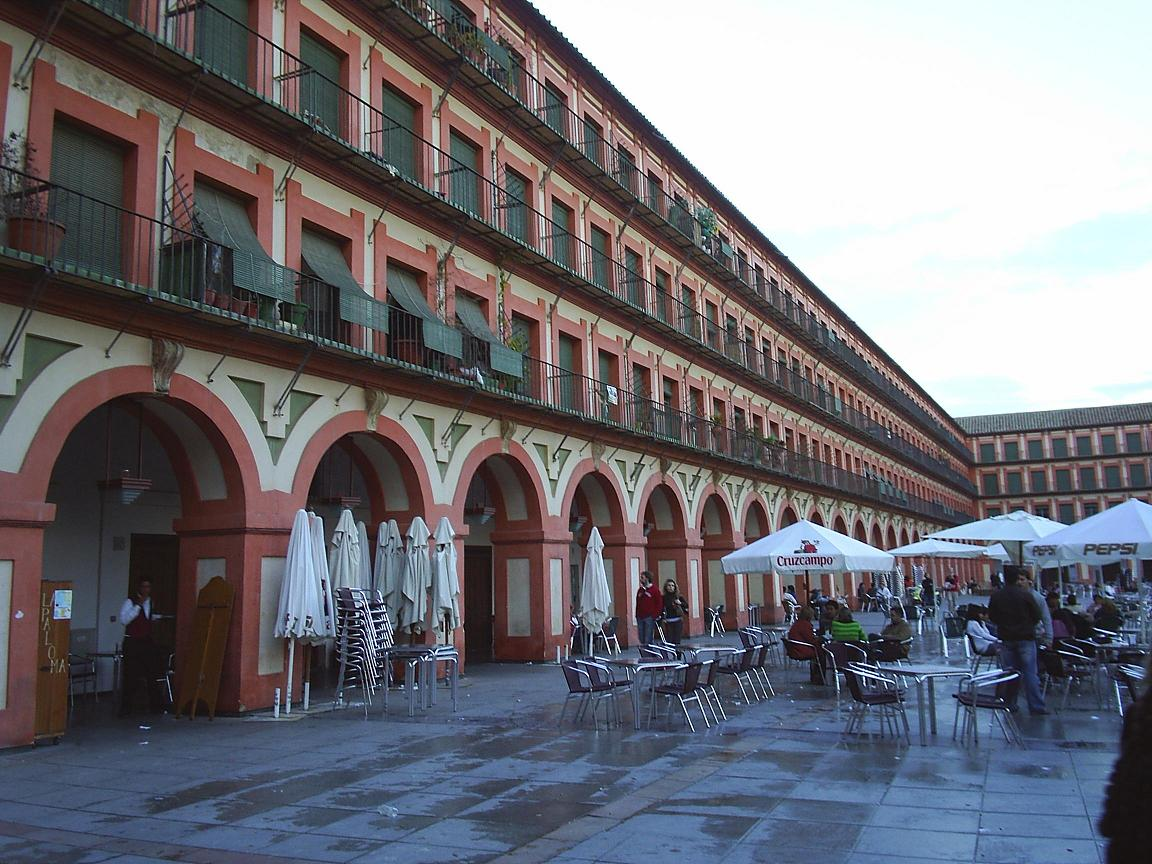 Plaza de la Corredera de Cordoba. España